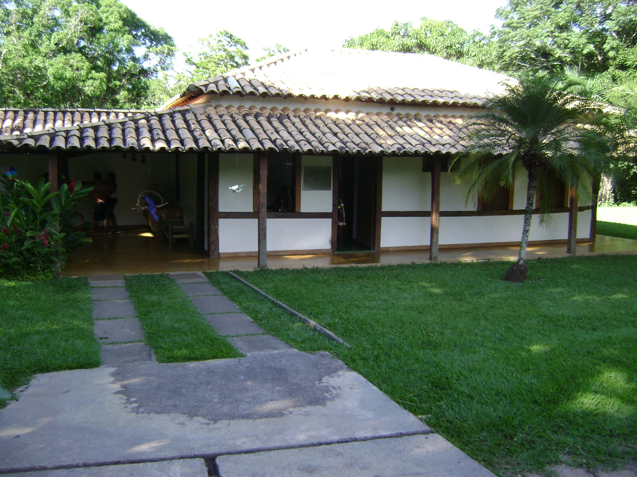 A primeira casa da cidade de Caldas Novas, construída por Martinho Coelho de Siqueira e depois reformada várias vezes, em Goiás, Brasil.